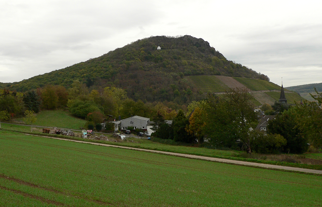 Maria-Hilf-Kapelle von Heppingen gesehen